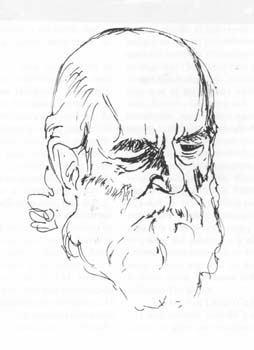 Retrato de José Manuel Briceño Guerrero